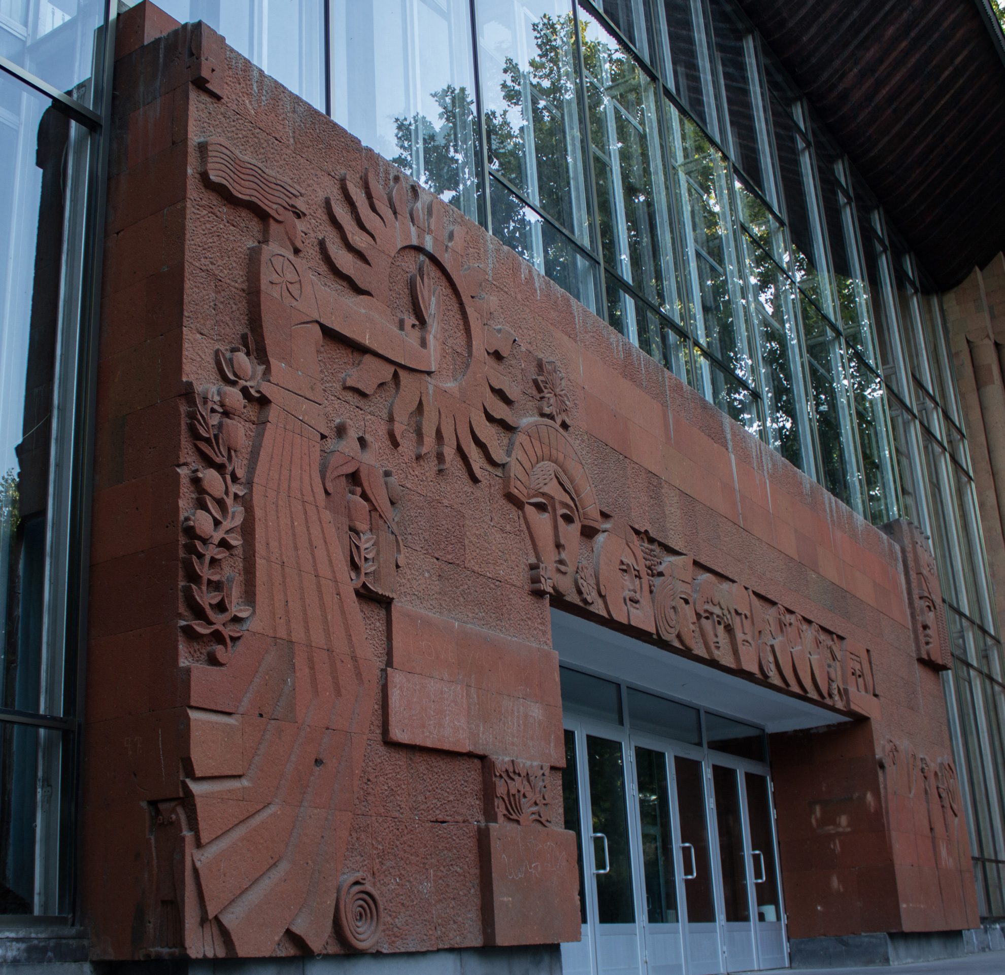 Թատրոնի շենք. Գաբրիել Սունդուկյանի անվան պետական ակադեմիական թատրոնը 6/78